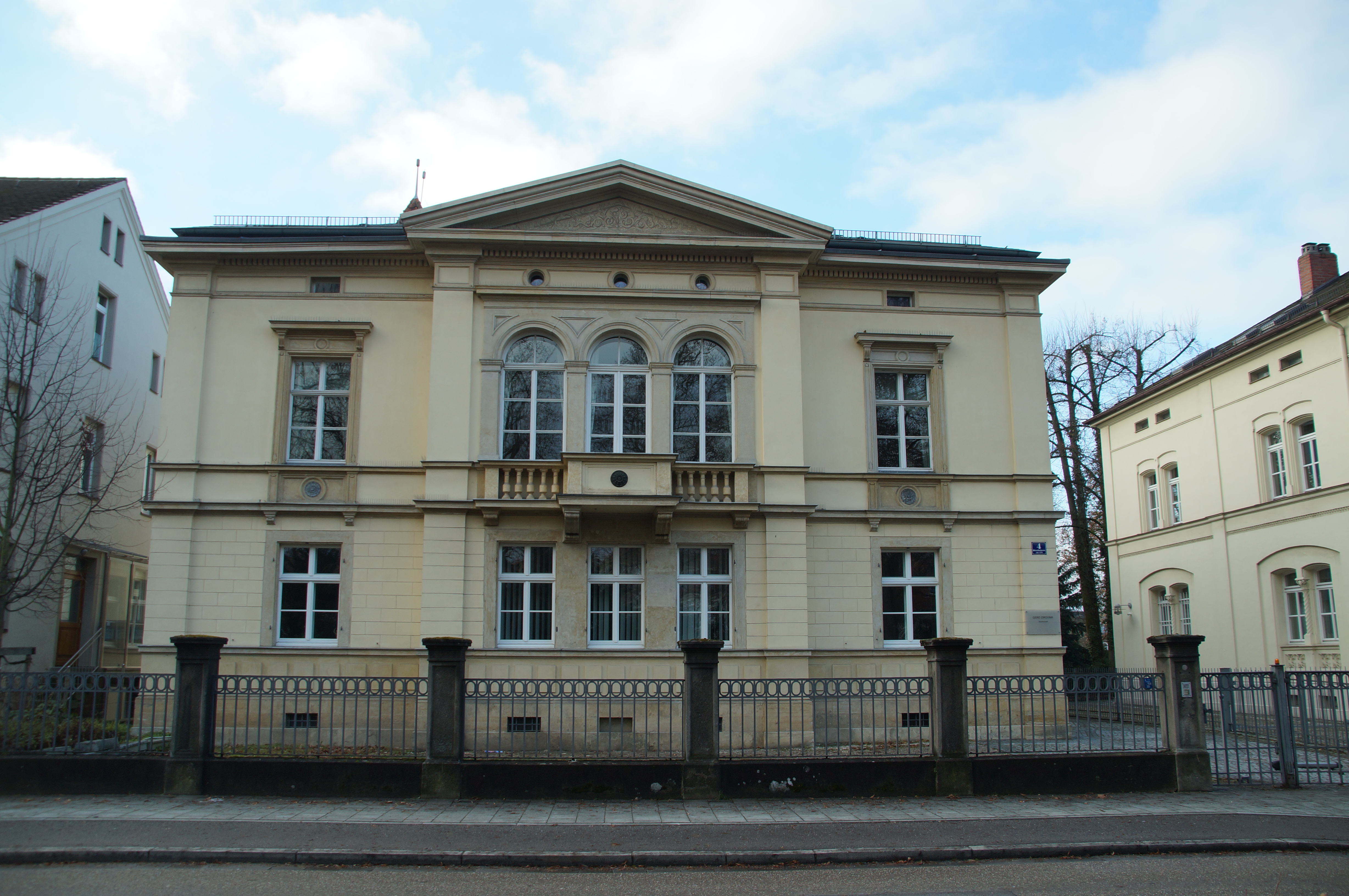 Villa, zweigeschossiger Walmdachbau mit Kniestock, Mittelrisalit und Eckpilastern, Fassadengliederungen Neurenaissance, 1863 This is a photograph of an architectural monument.